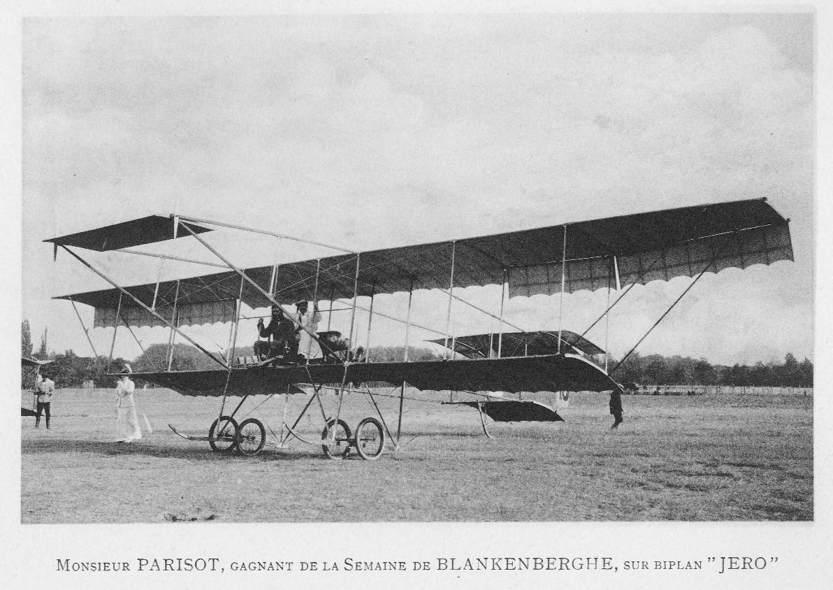 Parisot op Jero Nr 9 Week van Blankenbergh 1911 Verzameling Roland Verzele